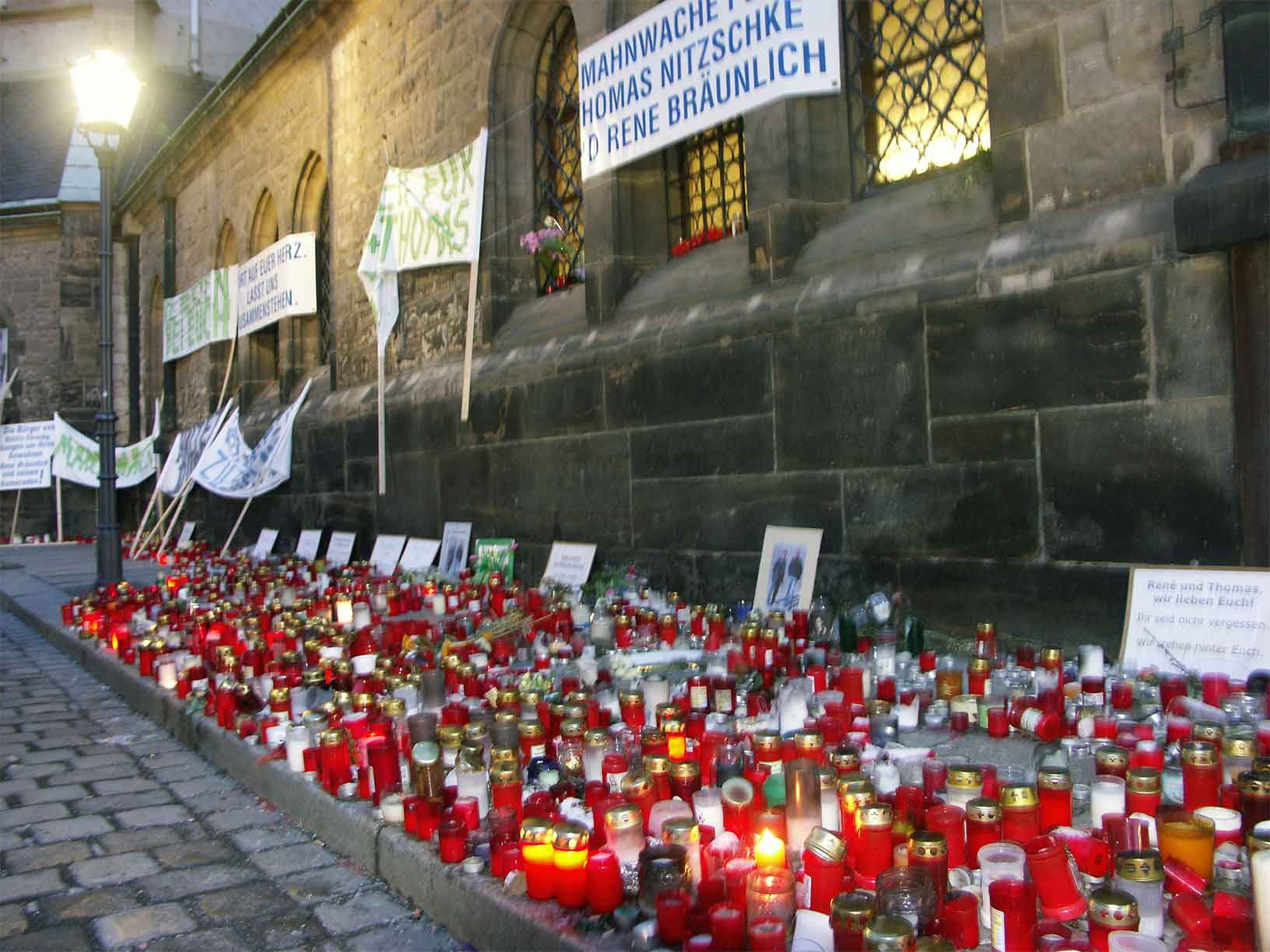 Lichter an der Mahnwache für die im Irak entführten Leipziger Ingenieure Thomas Nitschke und René Bräunlich, Nikolaikirchhof Leipzig